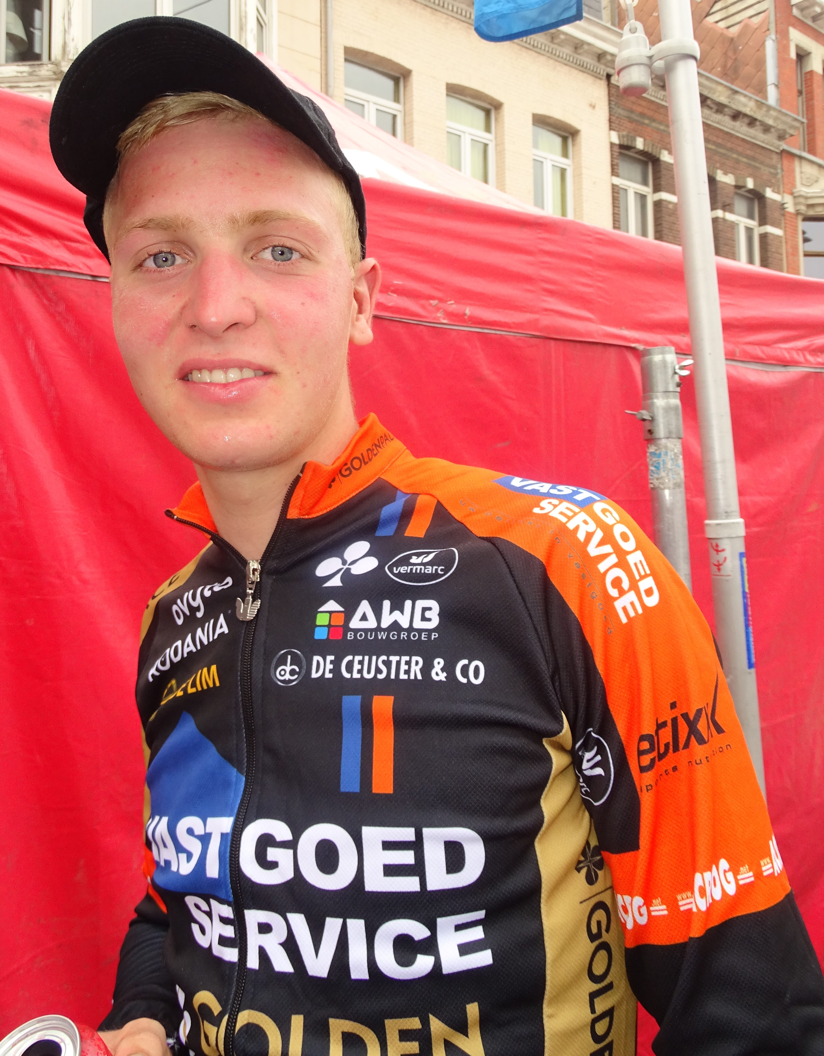 Reportage réalisé le dimanche 30 août à l'occasion du départ et de l'arrivée de la Coupe Sels 2015 à Merksem (Anvers), Belgique.